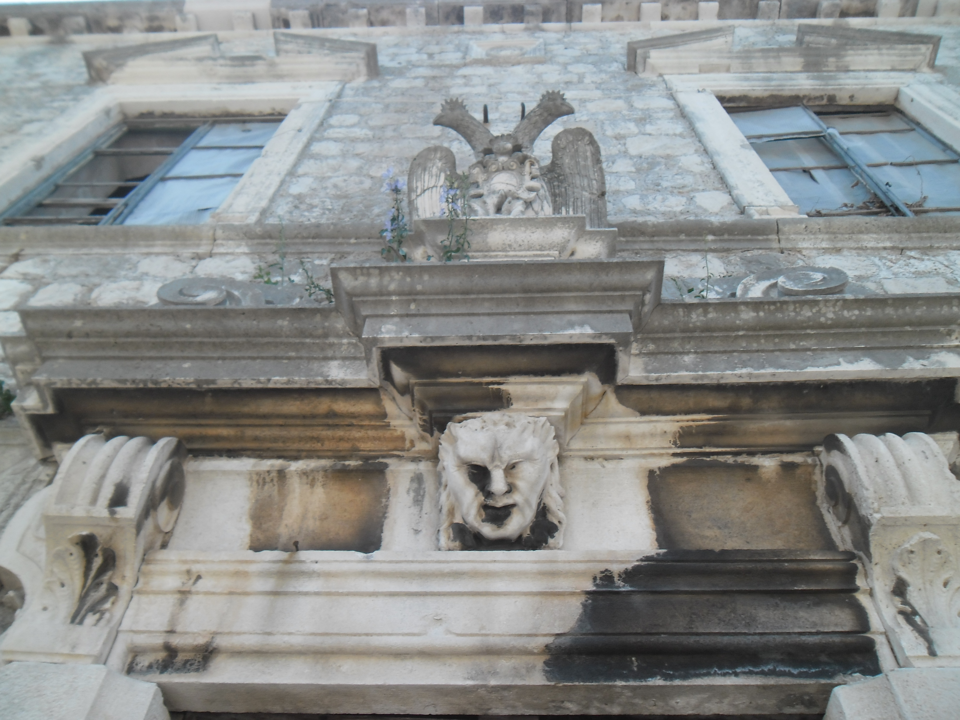 uresi ljetnikovca u Čajkovićima u Rijeci dubrovačkoj